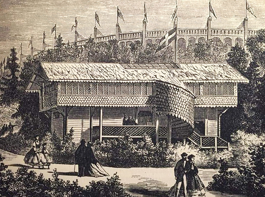 En kopia av Ornässtugan (med hjälp av arkitekten Fredrik Wilhelm Scholander) tjänstgjorde som Sveriges kansli och utställningshall vid världsutställningen i Paris 1867. När utställningen var över lät kung Karl XV återuppbygga loftbyggnaden i Ulriksdals slottsträdgård där den finns än idag. Samtida trägravyr.